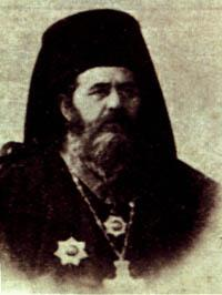 Космас Евмофопулос